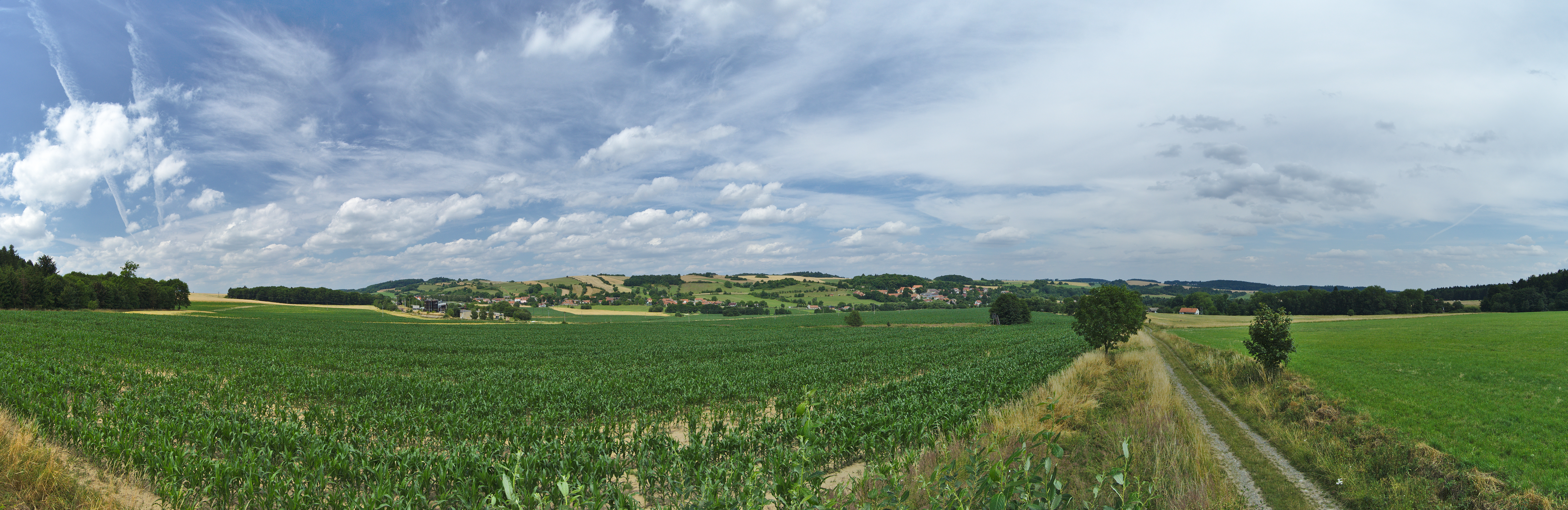 Panorama Jesence a Dzbelu z cesty nad Jesencem, okres Prostějov